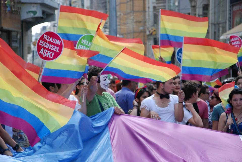 XXII. İstanbul Onur Haftası etkinlikleri kapsamında geleneksel olarak yapılan İstanbul Onur Yürüyüşü'nden görünüm, 2014.